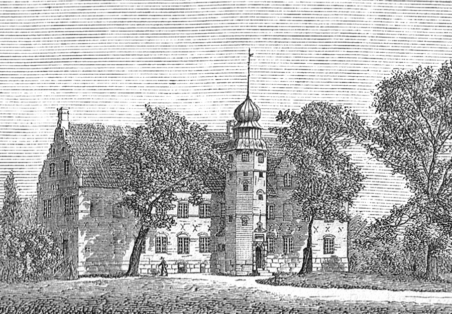 Berritsgård er en gammel hovedgård, som nævnes første gang i 1382. Gården ligger i Tårs Sogn, Musse Herred, Sakskøbing Kommune. Hovedbygningen er opført i 1586